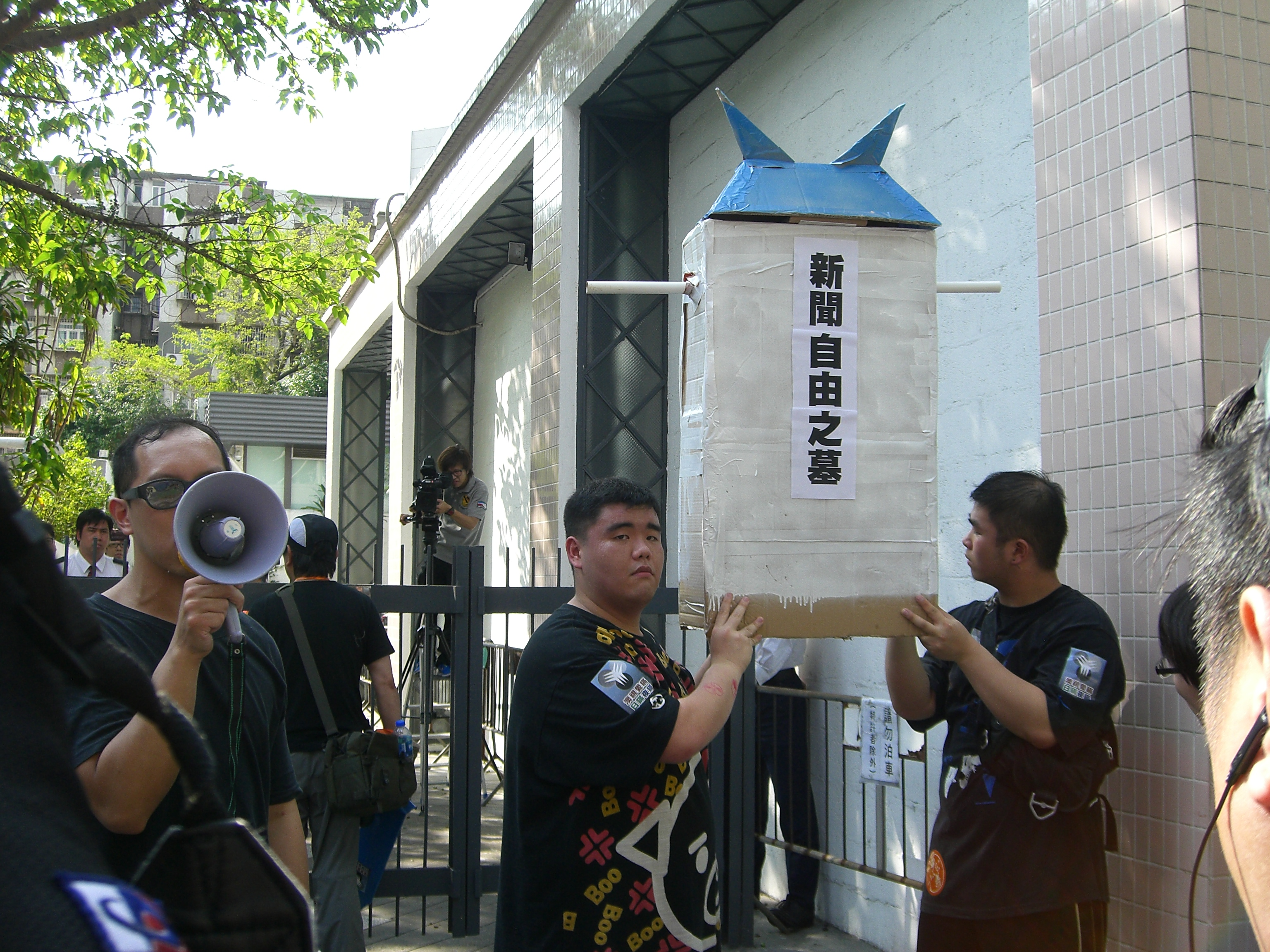 2012年澳門勞動節遊行